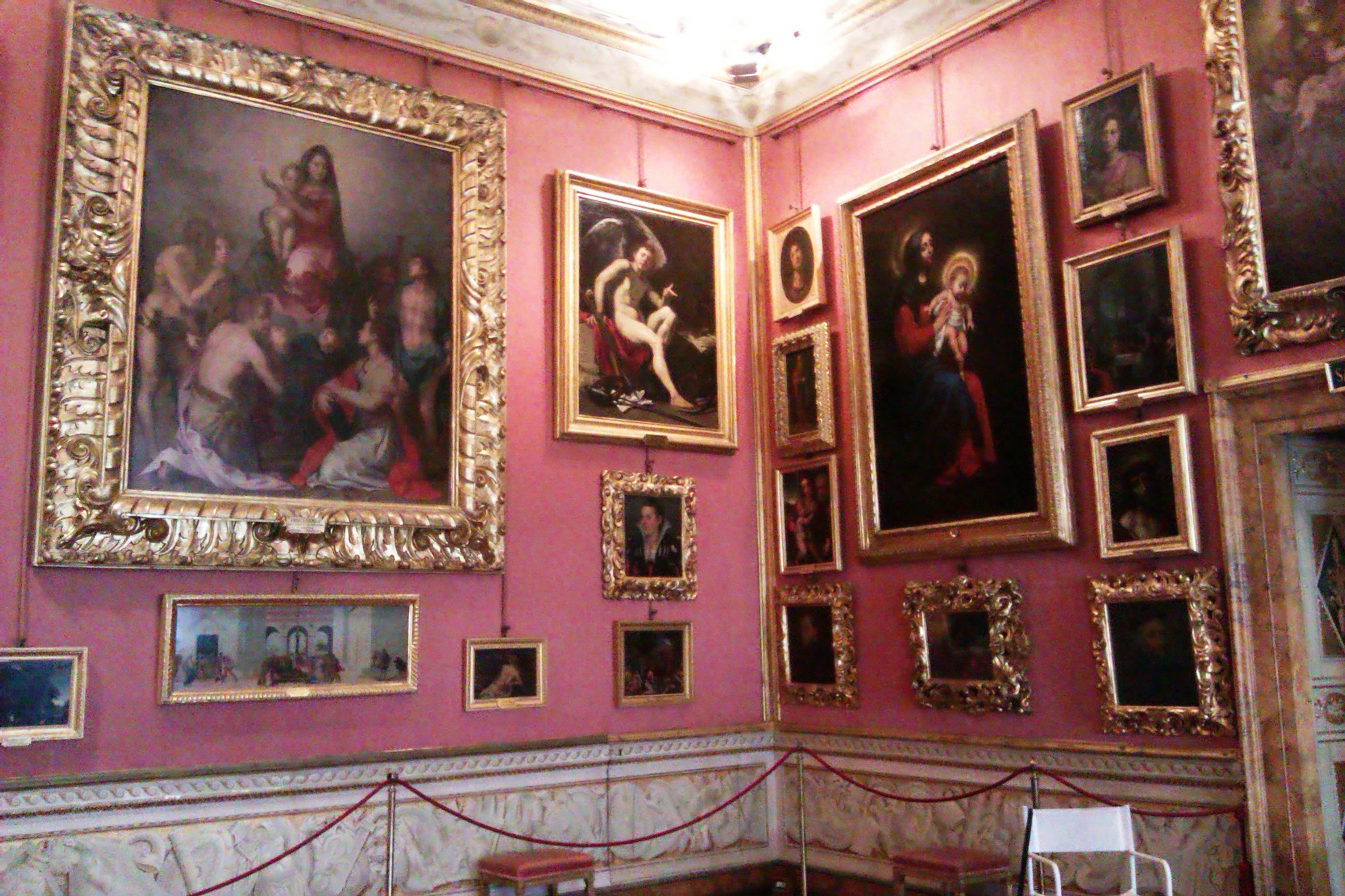 Salle d'Aurore de la Galerie Palatine, à Florence.